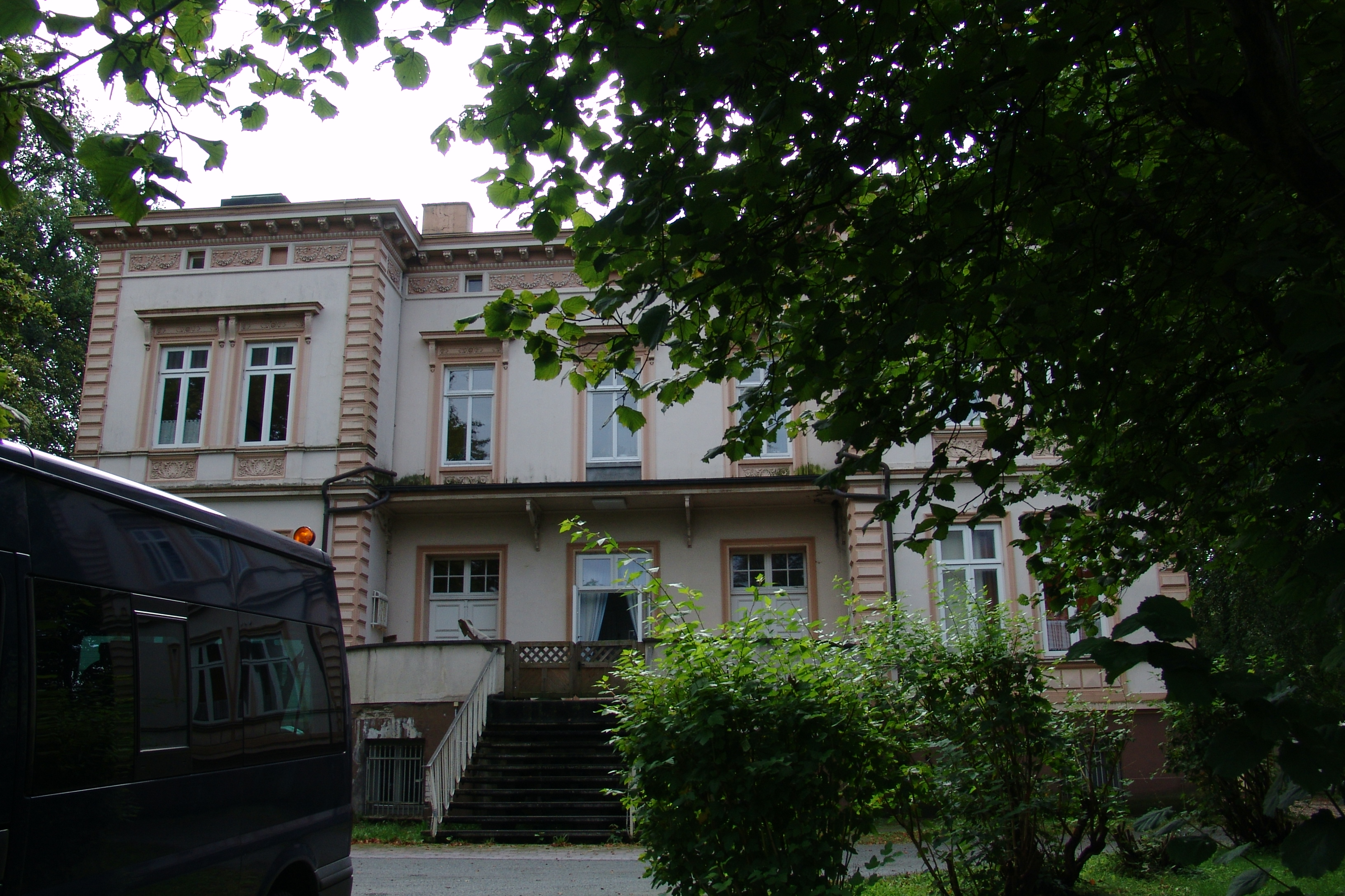 Villa Rauch in Bremen, Richthofenstraße 70.Das abgebildete Objekt ist ein geschütztes Kulturdenkmal in der Freien Hansestadt Bremen, mit der Nr. 1509 beim Landesamt für Denkmalpflege registriert.